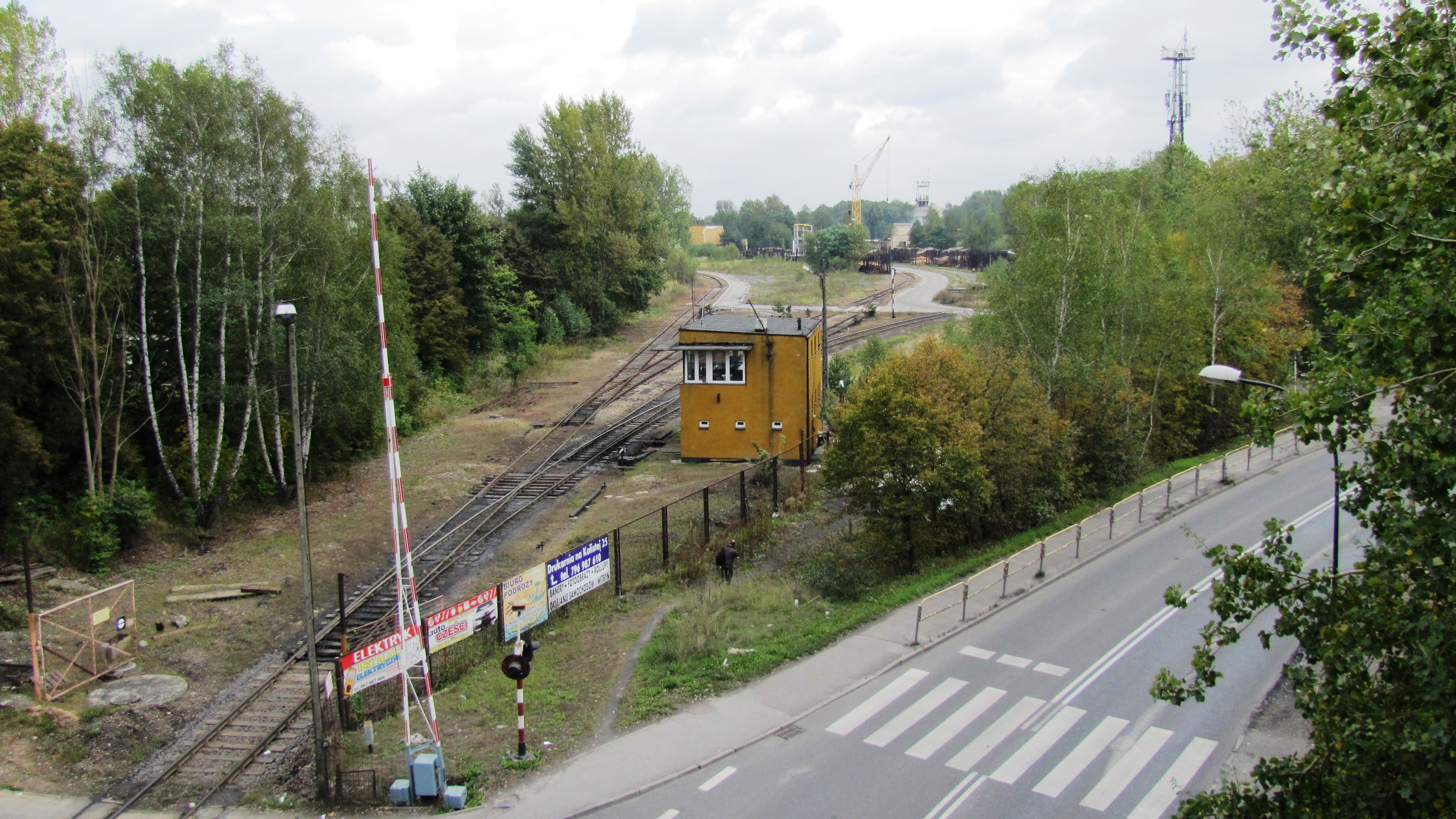 Bocznica kolejowa KWK "STASZIC". Plac Drzewny.